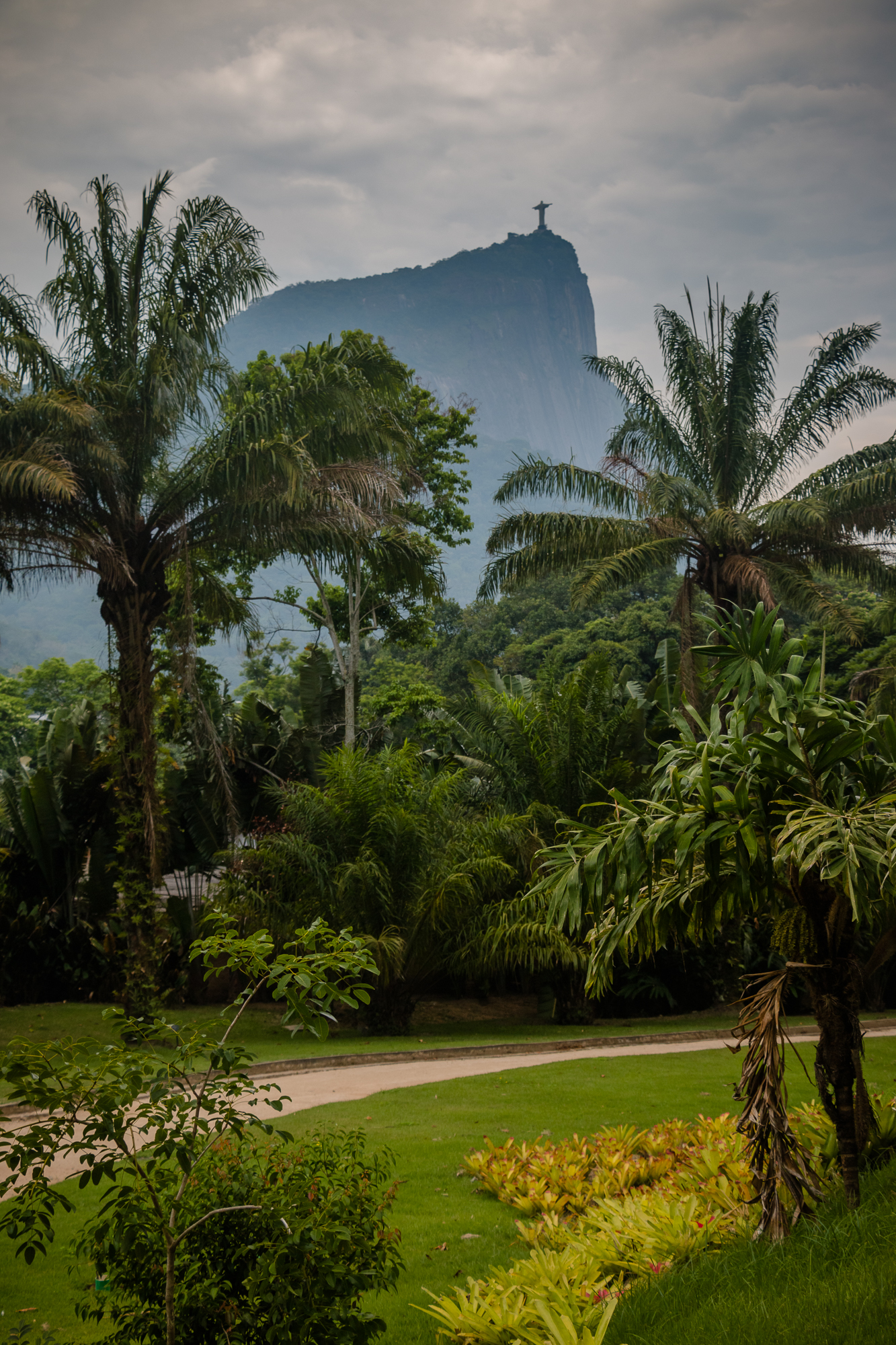 Neblina no Corcovado, visto do Jardim Botânico, Rio de Janeir/RJ.